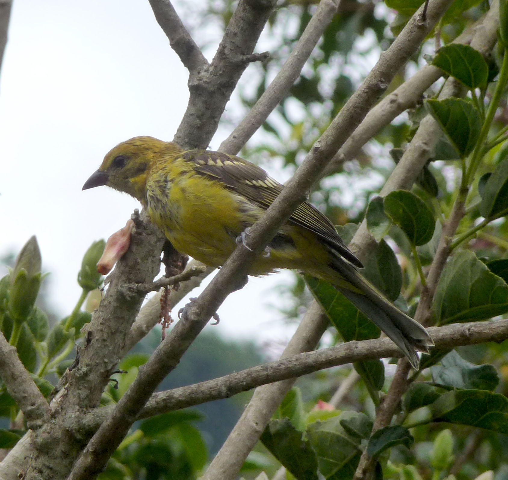 Flame-colored Tanager. Female. Piranga bidentata